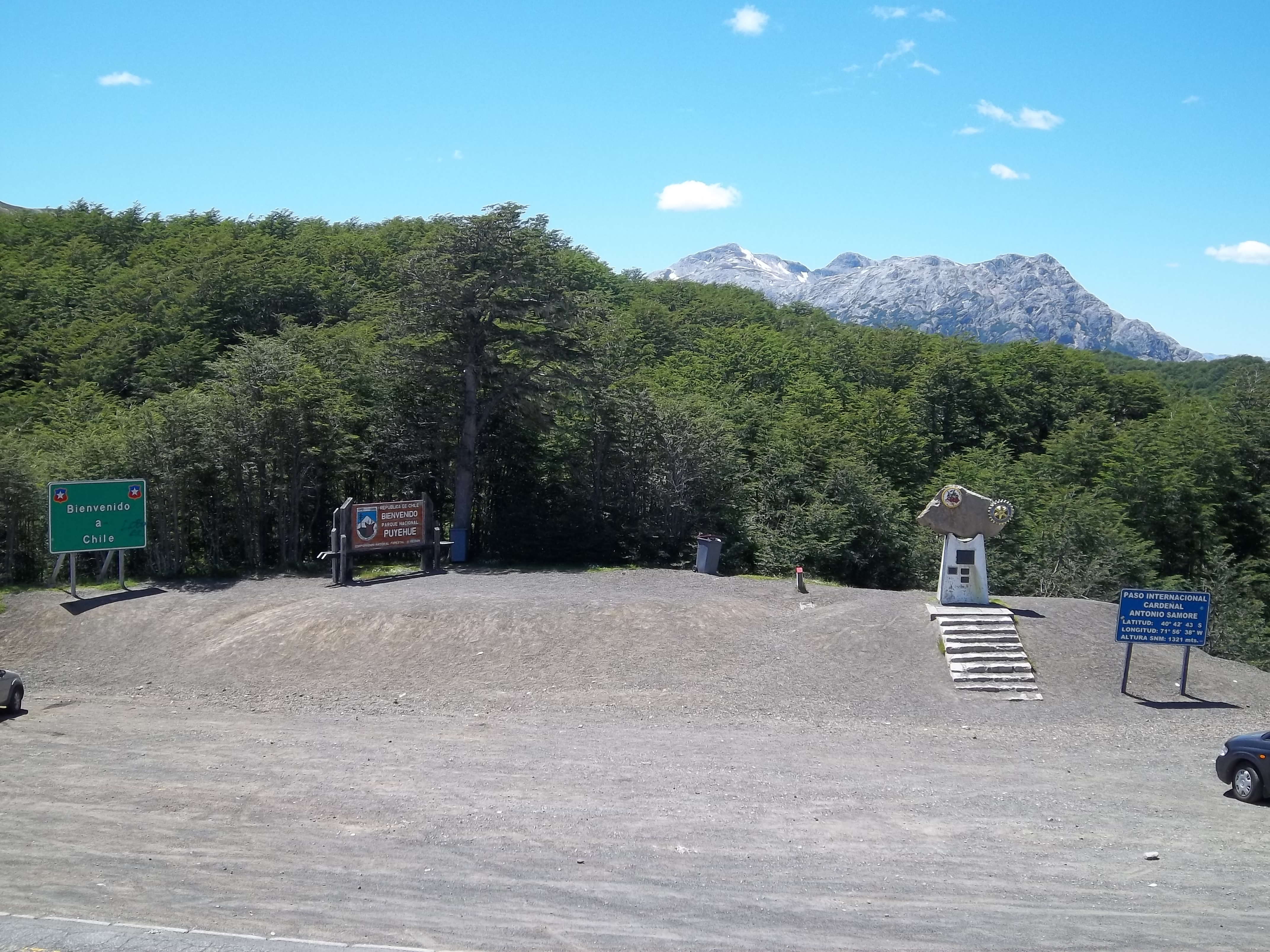 Paso Cardenal Samoré ubicado entre la X Región, Chile (hacia la izquierda de la imagen) y la provincia del Neuquén, Argentina (hacia la derecha de la imagen).